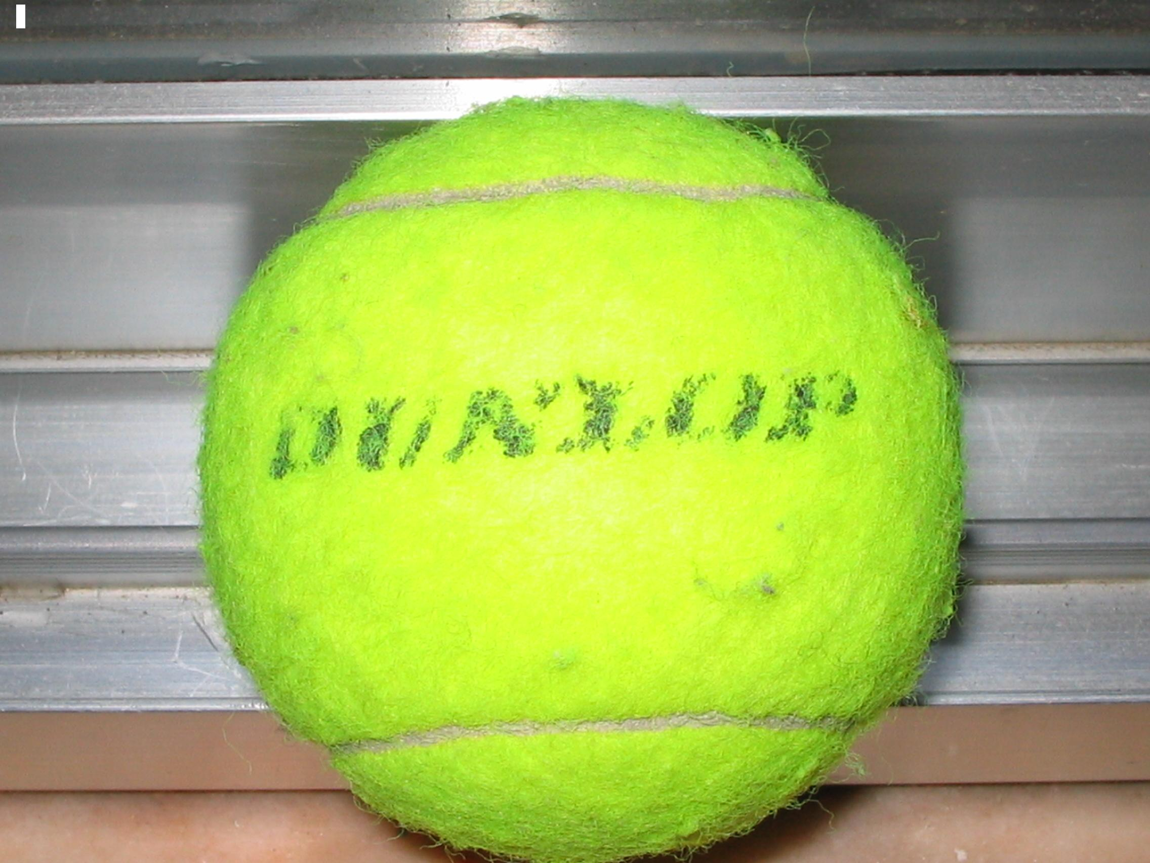 Tennis